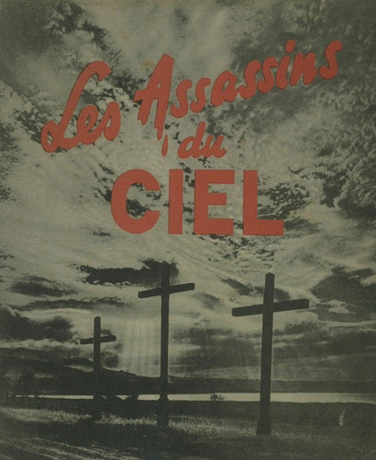 Brochure de 20 pages tenues par deux agrafes illustrée de nombreuses photos de bombardements, de destructions, d'obsèques de victimes de ces bombardements (image de Rennes) avec une chronologie précise du 18 juin 1940 au 4 avril 1943. Elle s'en prend aux alliés.